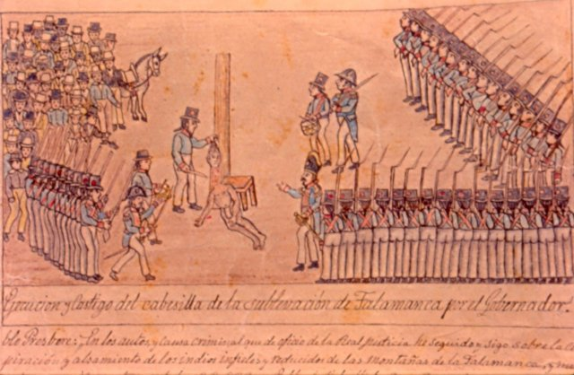 Ejecución de Pablo Presbere en la ciudad de Cartago, Costa Rica, el 4 de julio de 1710.